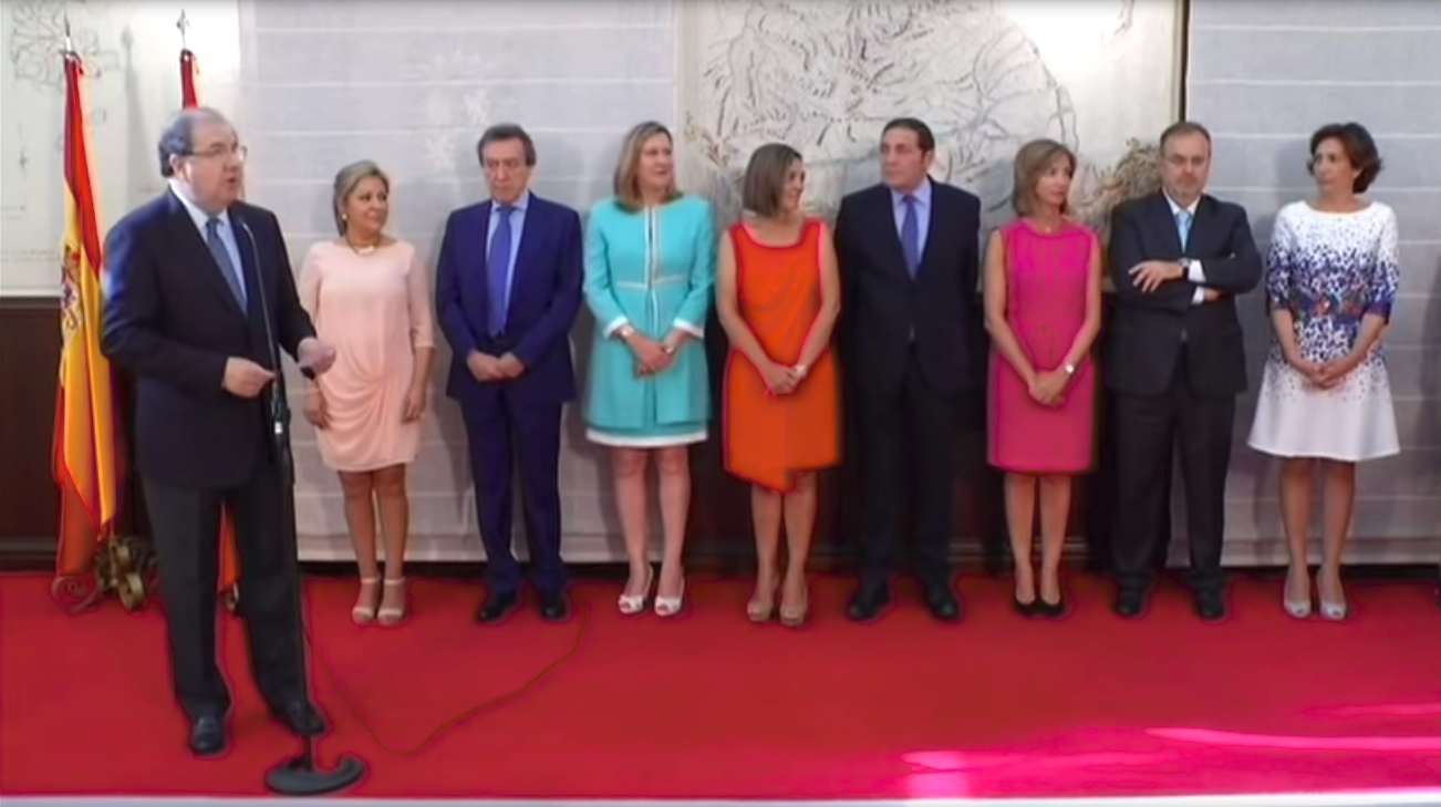 'Acto de Toma de posesión de la vicepresidenta y los consejeros del Gobierno autonómico'